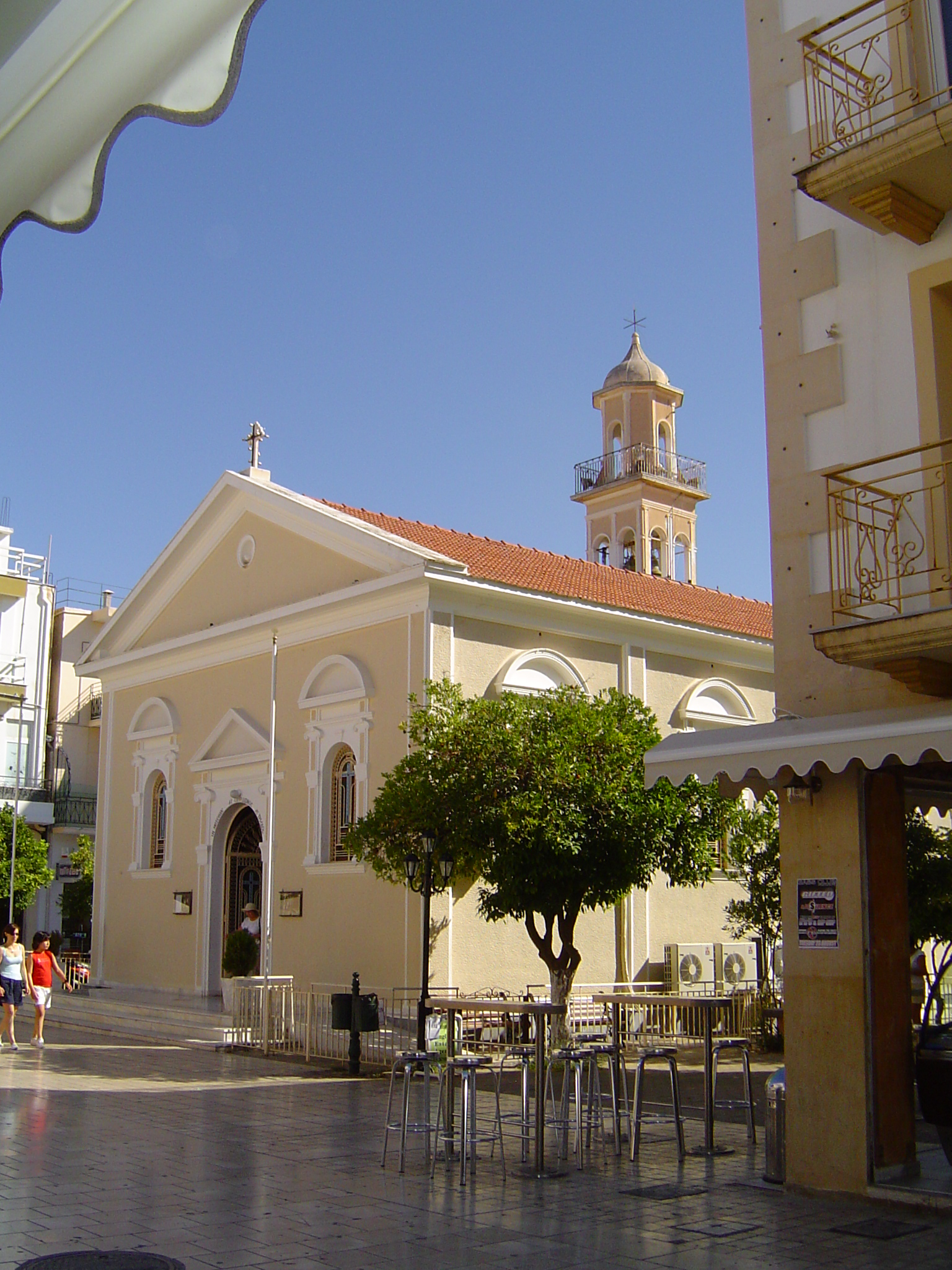 Vue vun Argostoli.